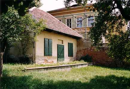 Johann Michael Ackners Kabinett in Hammersdorf (Guşteriţa) bei Hermannstadt (Sibiu), Siebenbürgen Möglichkeiten zur Lizenzierung